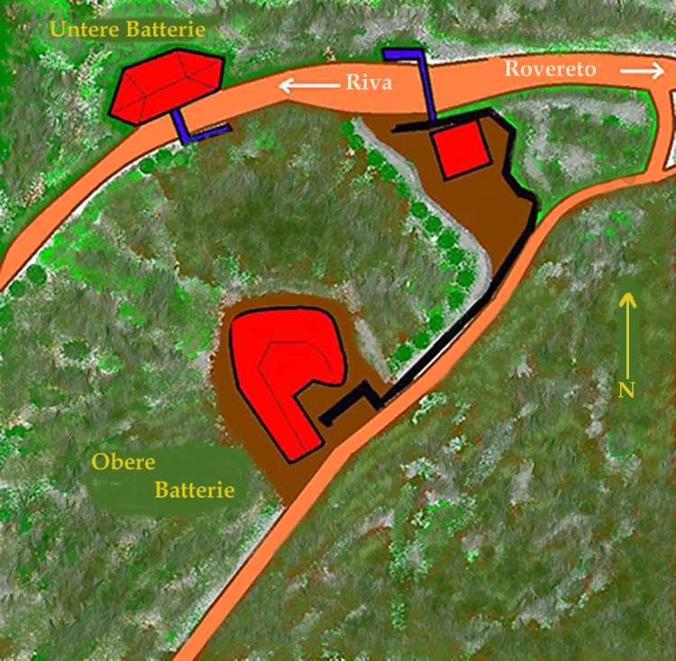 Plan Werk Nago